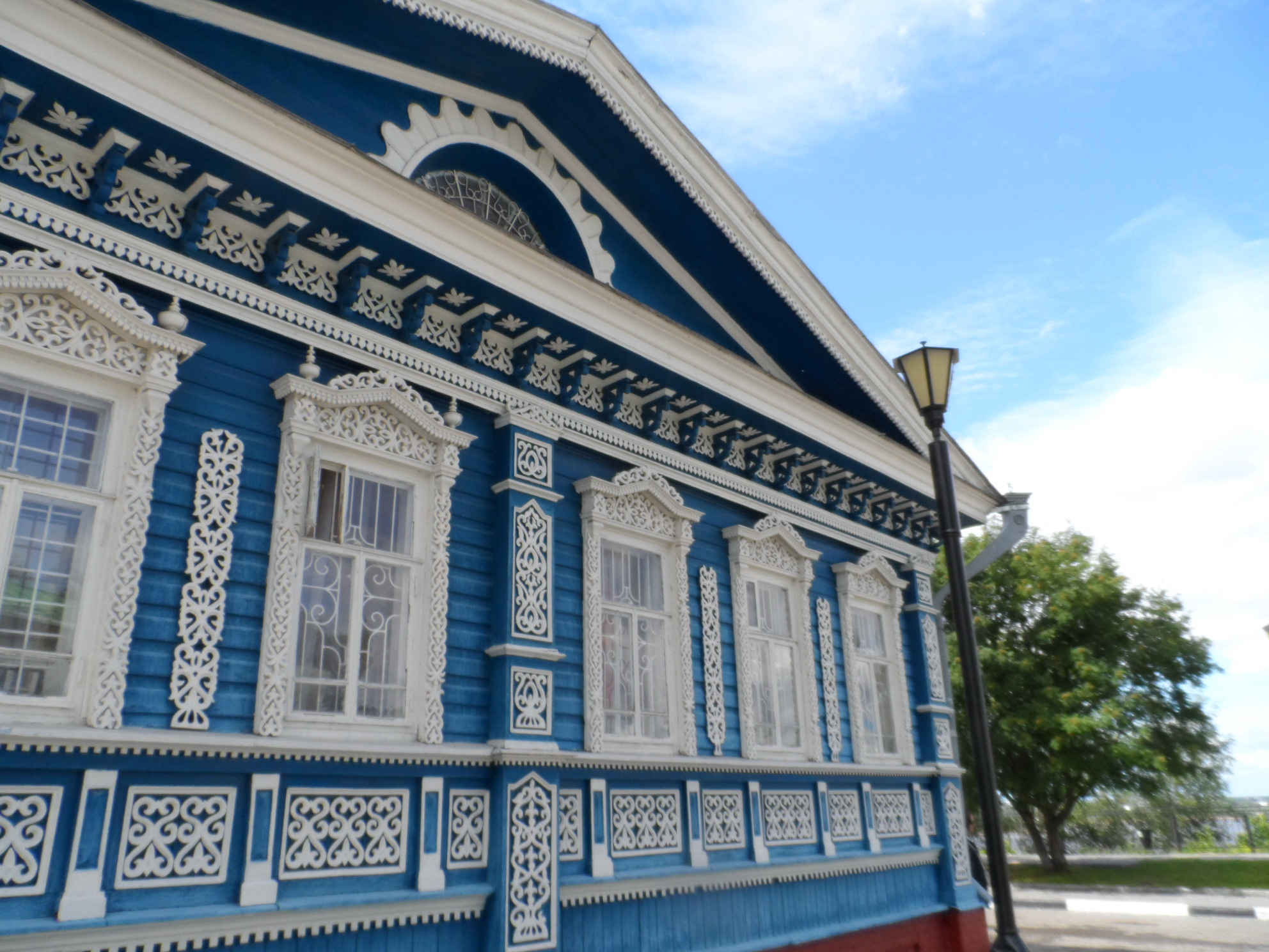 Жилой дом в г. Городец, украшенный местной традиционной резьбой по дереву. 2015 г.